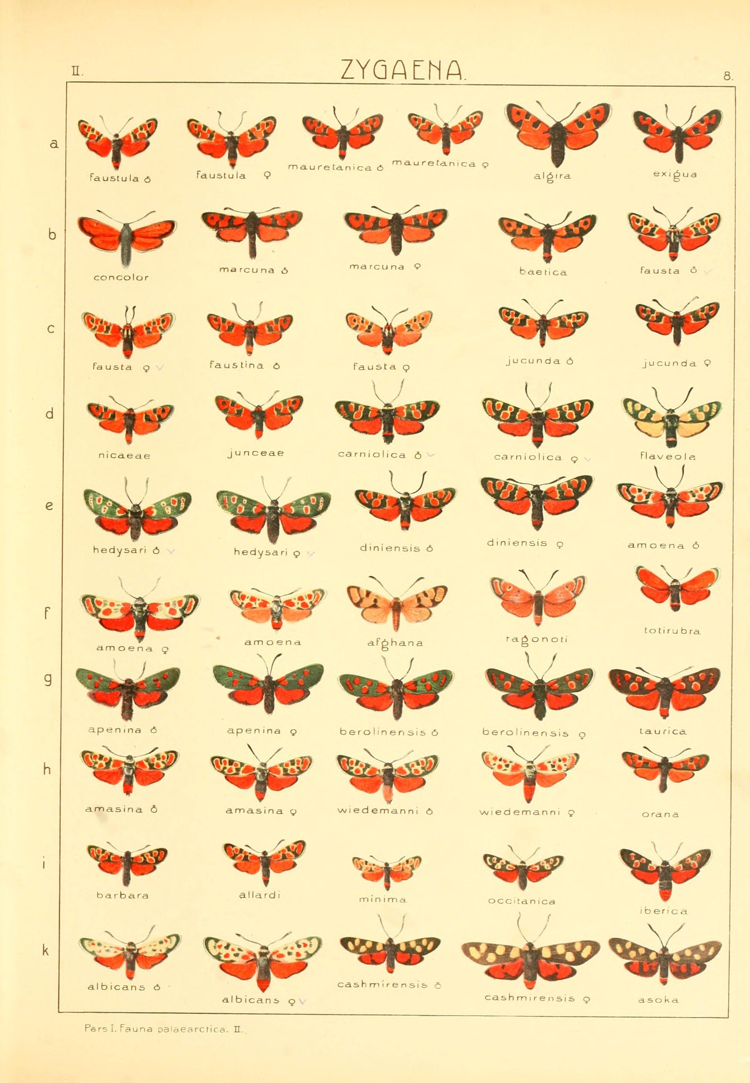 Plate from Die Gross-Schmetterlinge der Erde (The Macrolepidoptera of the World) Vol. 2 Plate According to Lepindex faustula = Zygaena felix ssp. constantinensis Reiss & Tremewan, 1964 mauretanica = Zygaena felix ssp. constantinensis Reiss & Tremewan, 1964 algira = Zygaena algira Boisduval, 1834 exigua = Zygaena algira Boisduval, 1834 concolor = Zygaena algira Boisduval, 1834 Zygaena marcuna Oberthür, 1888 Zygaena fausta ssp. baetica Rambur, 1839 Zygaena fausta Linnaeus, 1767 Zygaena fausta ssp. faustina Ochsenheimer, 1808 Zygaena fausta ssp. jucunda Meissner, 1818 Zygaena fausta ssp. junceae Oberthür, 1884 Zygaena fausta ssp. baetica Rambur, 1839 Zygaena carniolica Scopoli, 1763 Zygaena carniolica ssp. flaveola Esper, 1786 Zygaena carniolica ssp. hedysari Hübner, 1796 Zygaena carniolica ssp. diniensis Herrich-Schäffer, 1852 amoena = Zygaena carniolica Scopoli, 1763 Praezygaena afghana Moore, 1859 raganoti = Zygaena carniolica ssp. virginea Müller, 1766 totirubra = Zygaena carniolica Scopoli, 1763 Zygaena carniolica ssp. hedysari Hübner, 1796 apenina =Zygaena carniolica ssp. hedysari Hübner, 1796 Zygaena carniolica ssp. berolinensis Lederer, 1853 Zygaena carniolica ssp. taurica Staudinger, 1879 Zygaena carniolica ssp. amasina Staudinger, 1879 Zygaena carniolica ssp. wiedemannii Ménétriés, 1839 Zygaena orana Duponchel, 1835 Zygaena orana ssp. barbara Herrich-Schäffer, 1846 Zygaena orana allardi Oberthür, 1878 minima (minor in text) tiny form of Zygaena orana allardi Oberthür, 1878 Zygaena occitanica (Villers, 1789) iberica Stgr. forma of Zygaena occitanica (Villers, 1789) now Zygaena occitanica ssp. arragonica Holik & Sheljuzhko, 1956 albicans Stgr forma of Zygaena occitanica (Villers, 1789) ? now Zygaena occitanica occitanica ssp. vandalitia Burgeff, 1926 Praezygaena caschmirensis asoka = Praezygaena caschmirensis